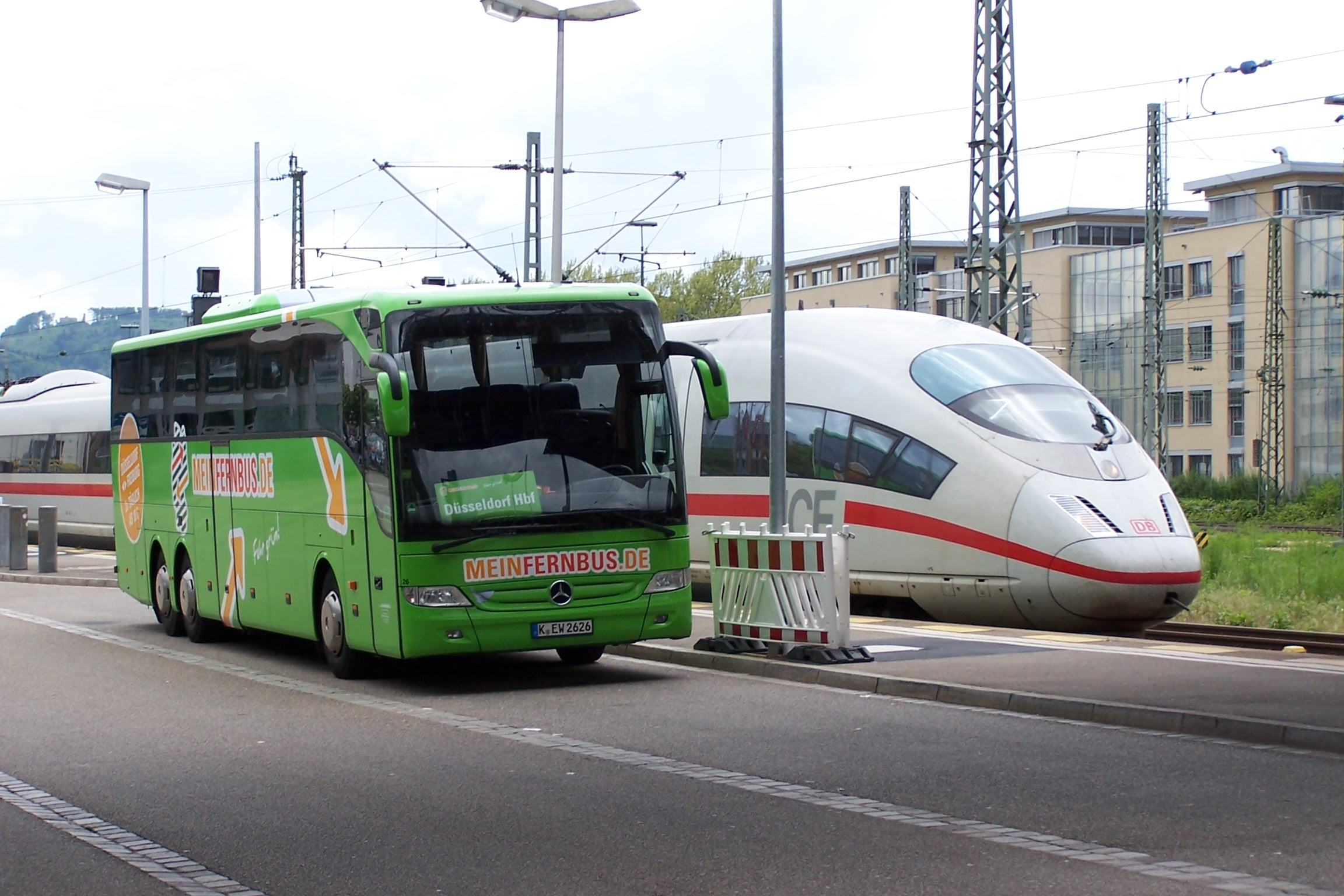 Ein Bus von MFB MeinFernbus in Freiburg, gleichzeitig fährt ein ICE 3 in der Freiburger Hauptbahnhof ein.